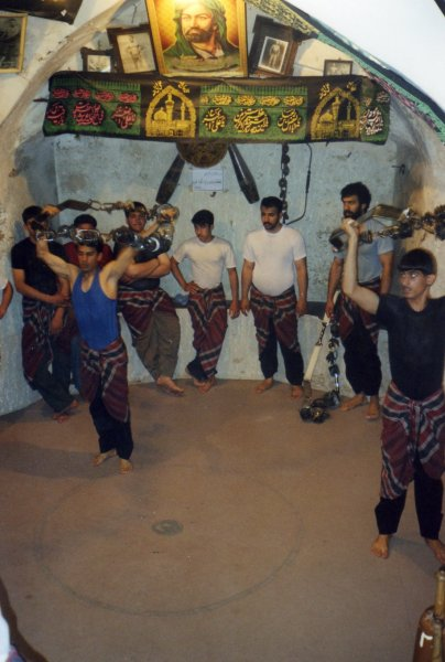 Zurkhaneh Avril 2006 Chiraz